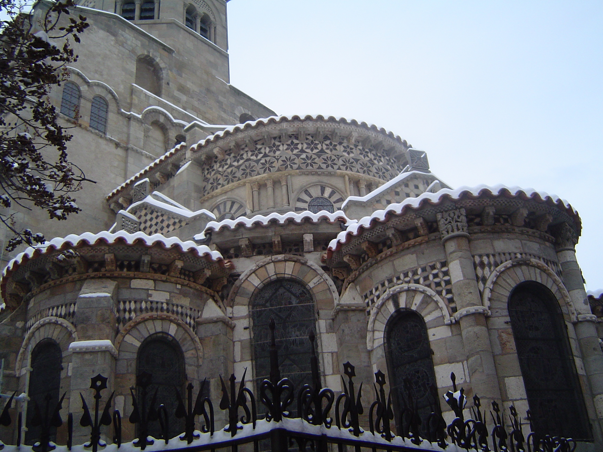 Chevet (récemment ravalé) de Notre-Dame-du-Port sous la neige.